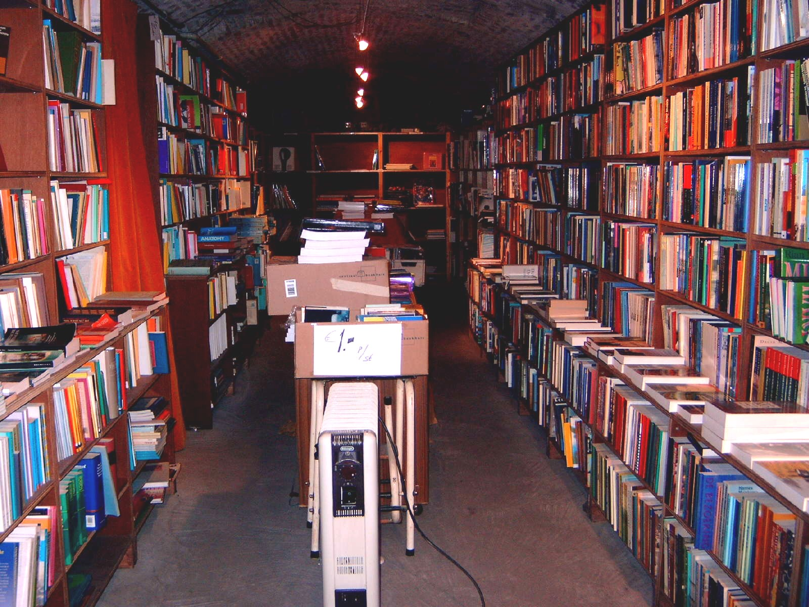 De ramsjafdeling van boekhandel De Tribune in Maastricht. Eigen opname.